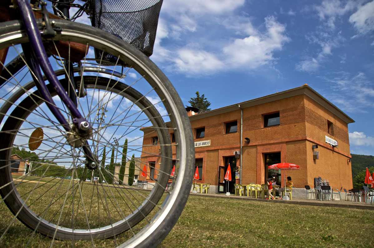 Imatge del Parc de l'Estació, a Sant Joan de les Abadesses (Ruta del Ferro i del Carbó)